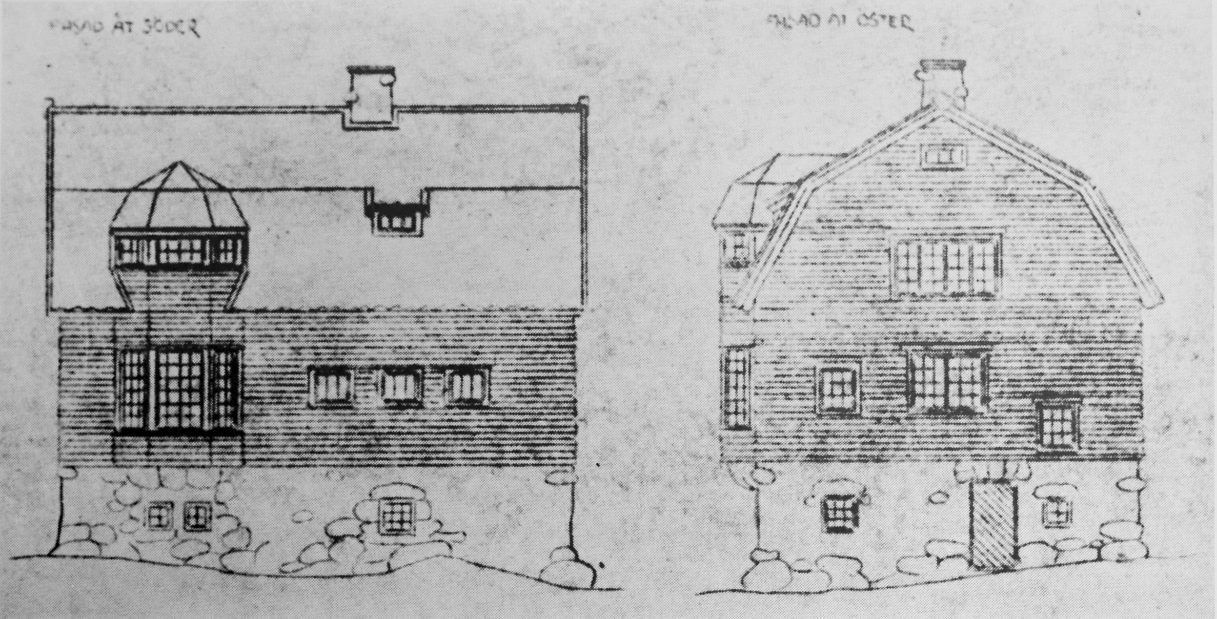 Fotografens villa, fasader mot söder och öster